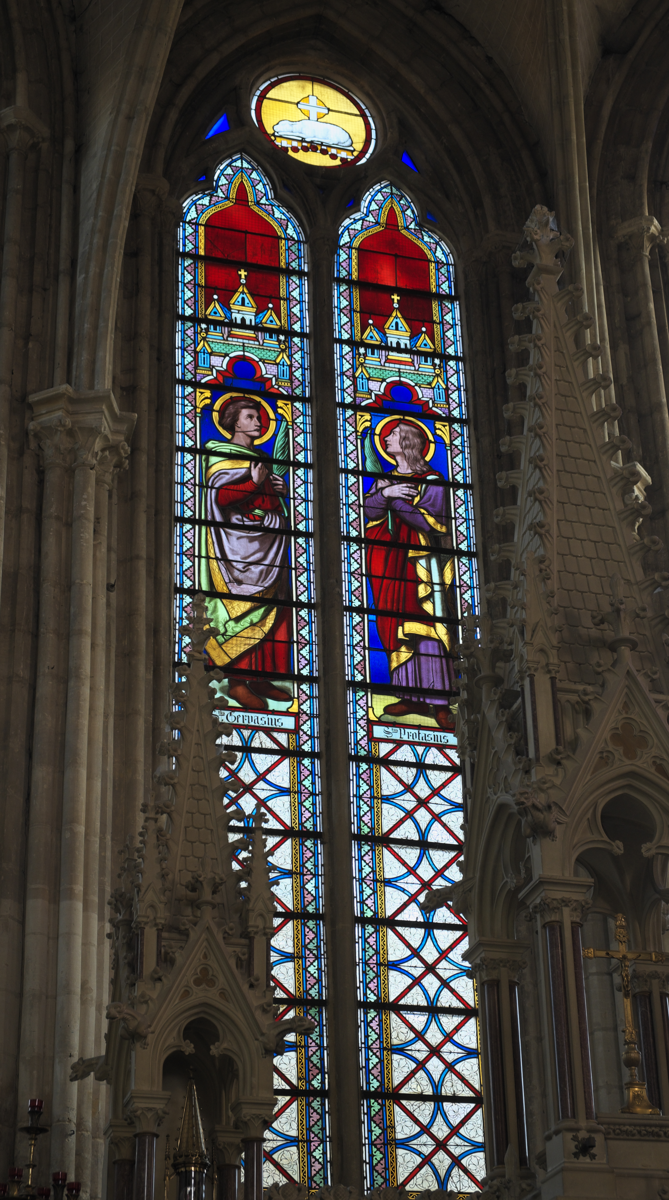 Katholische Pfarrkirche Saint-Gervais-Saint-Protais in Bessancourt im Département Val-d’Oise (Île de France/Frankreich), Bleiglasfenster von 1861, von Eugène Oudinot; Darstellung: Gervasius und Protasius